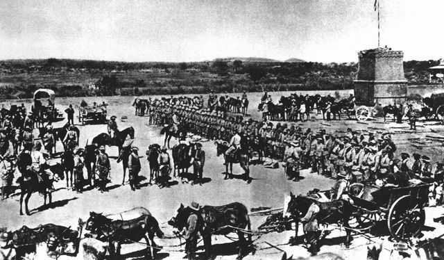 Einsegnung der deutschen 2. Marine-Feldkompanie im Schutzgebiet Deutsch-Südwestafrika für den Kampf gegen das Herero-Volk.